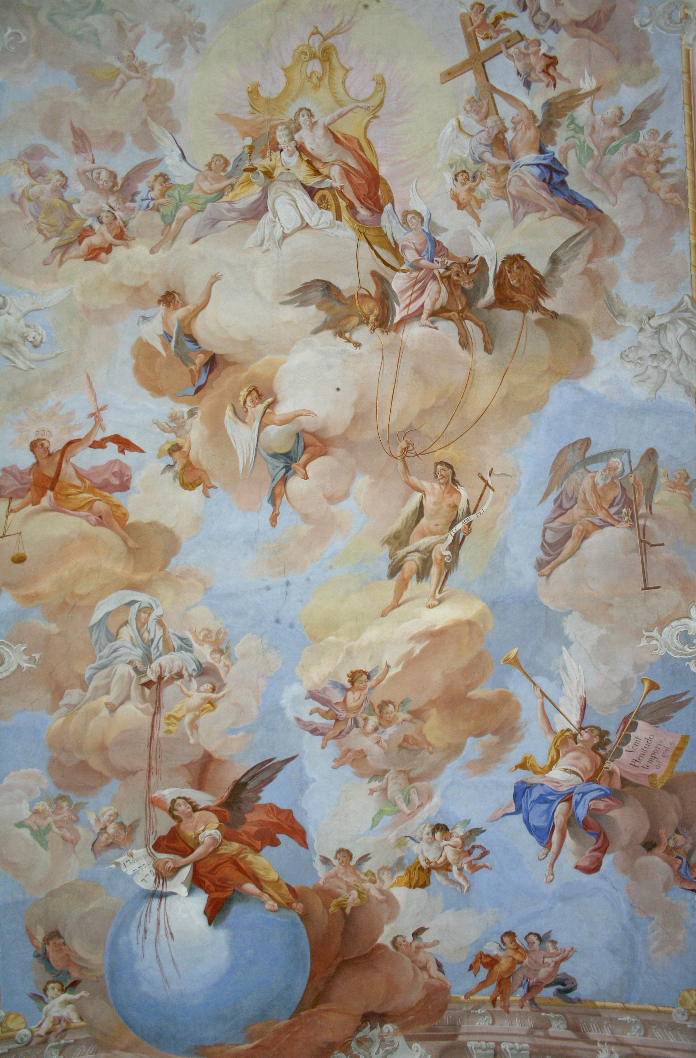 Deckenfresko im Langhaus der Pfarrkirche in Elbigenalp von Johann Jakob Zeiller; Triumph der Kirche und Erlösungsopfer Christi